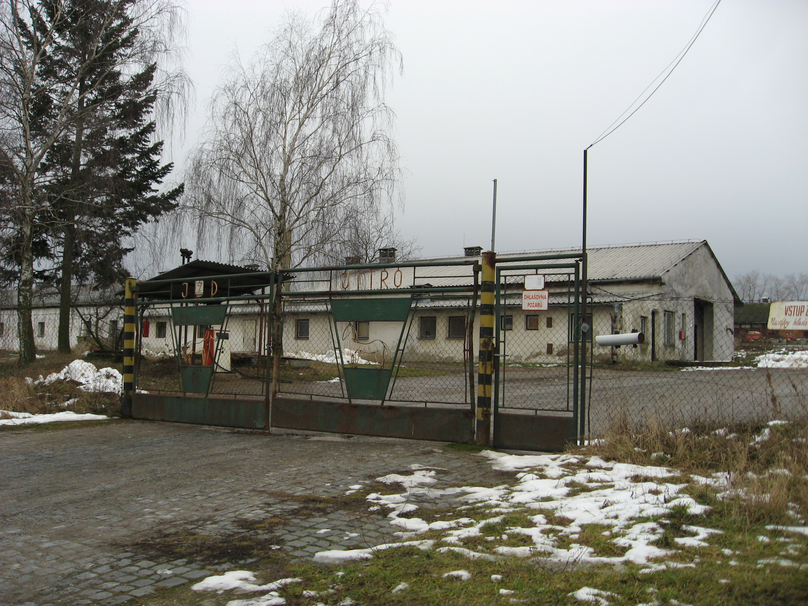 Jinačovice, vstup do JZD